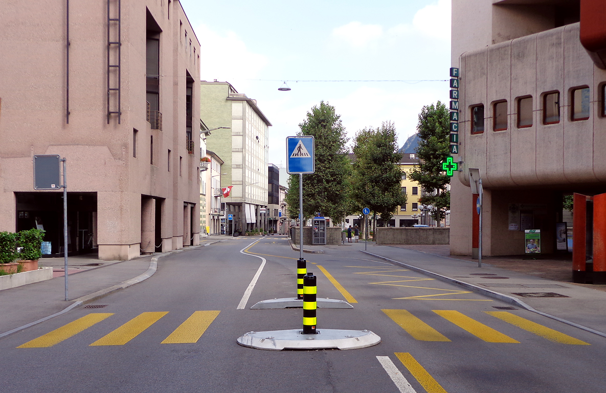 Chiasso, attraversamento pedonale in corso San Gottardo.